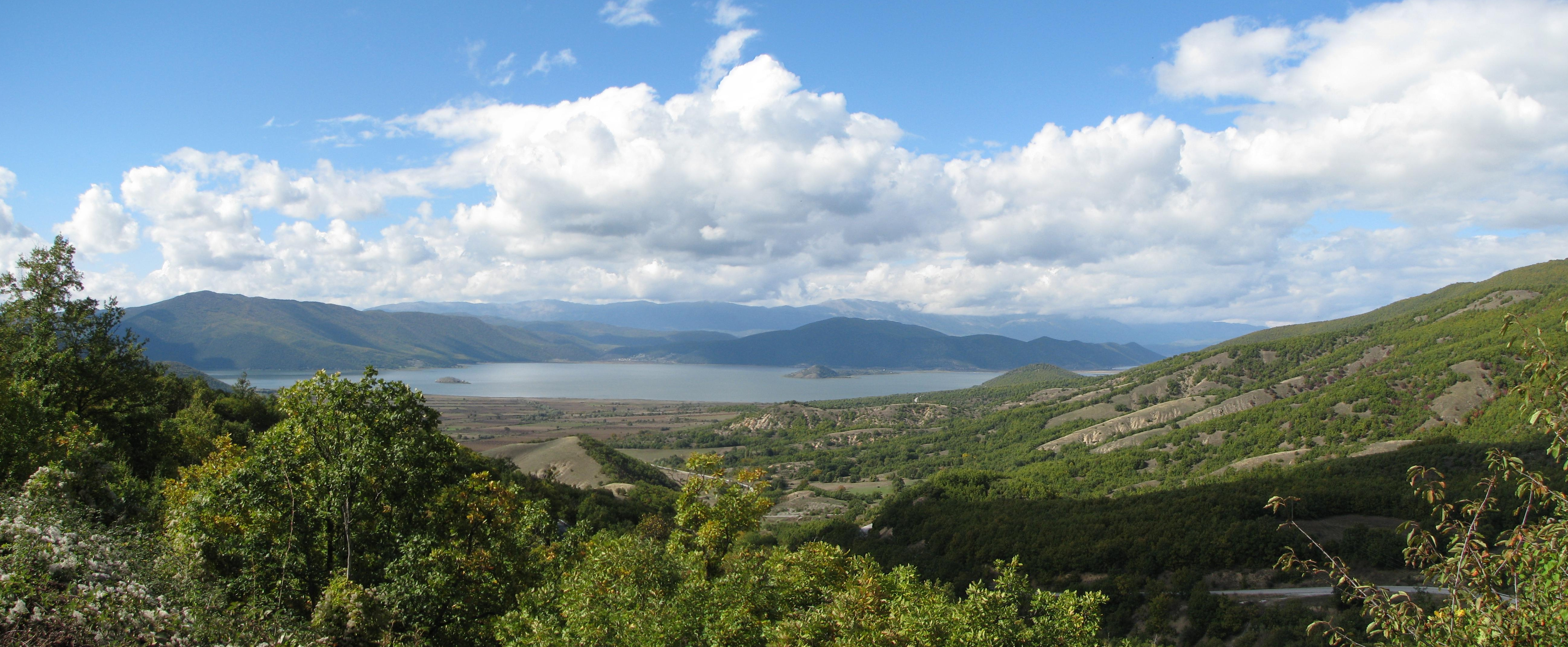 Панорама към Малкото Преспанско езеро от Баба.